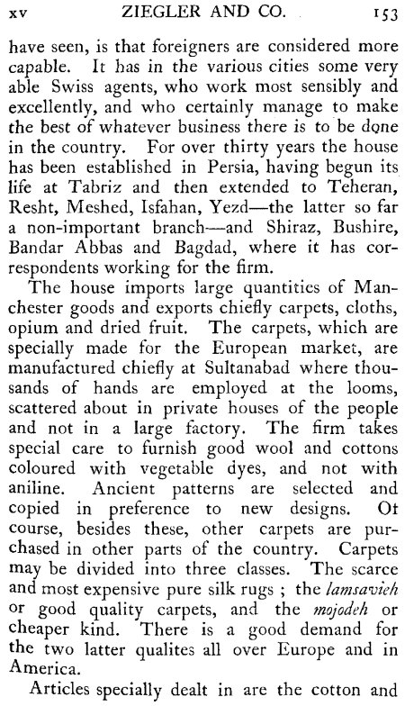 Deze foto van mijn eigen boek heb ik zelf gemaakt. Correspondentie over het gebruik van deze foto kunt u voeren via via mijn site: Arie M. den Toom Ridderkerk 1 juni 2008